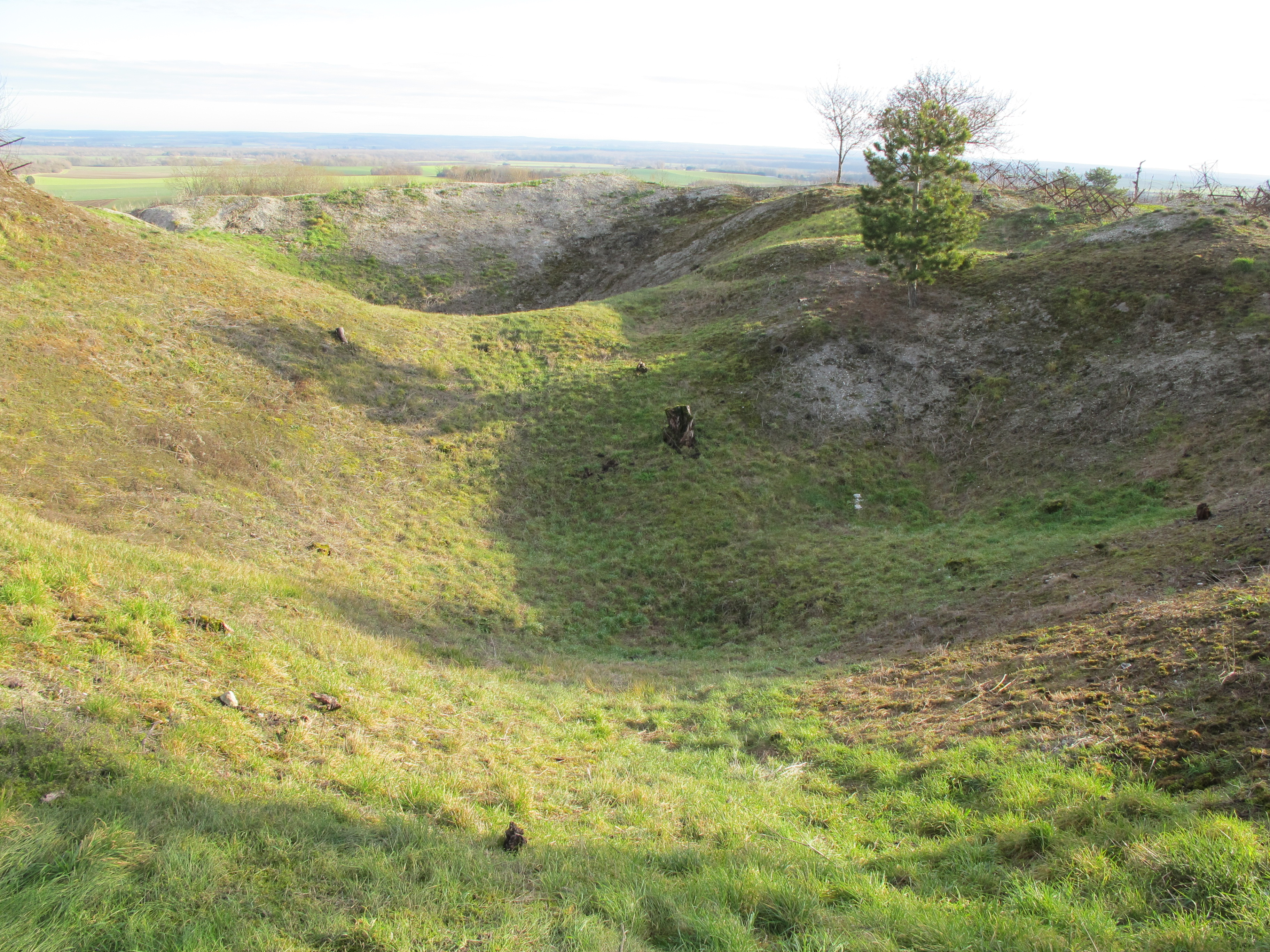 Entonnoir de mines de la Première Guerre mondiale à Massiges (France).